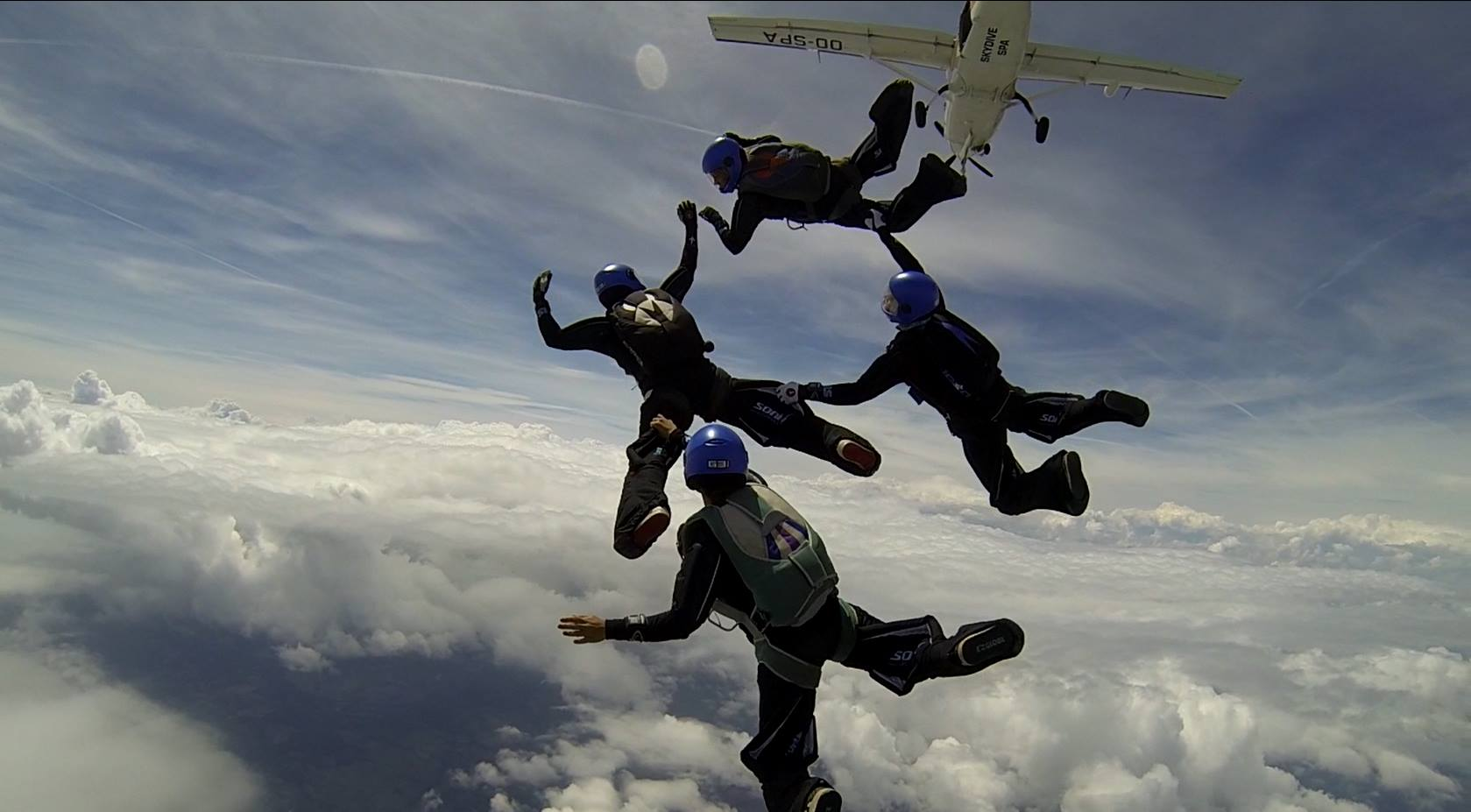 Sortie en H - Team Les Stunts (AAA feminin - Belgique)